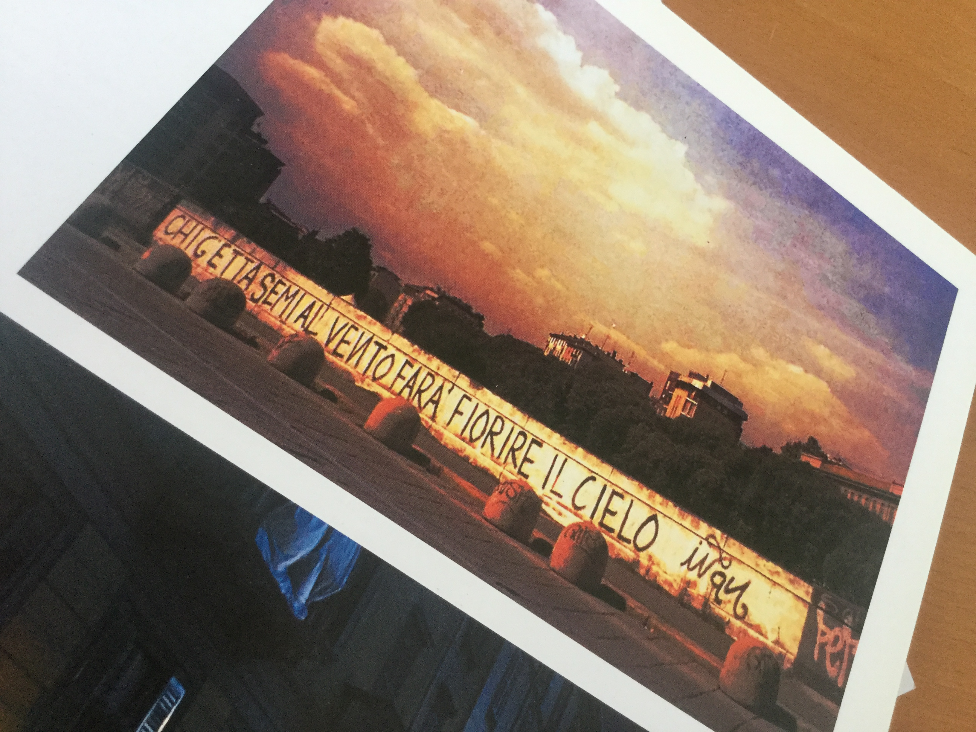 una tra i primi interventi dell'autore nella primavera del 2003 a Milano.